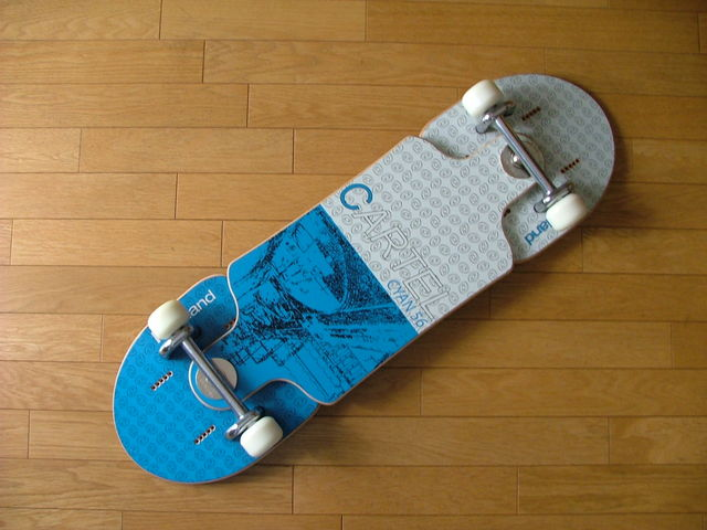 highland cartel56 (裏)